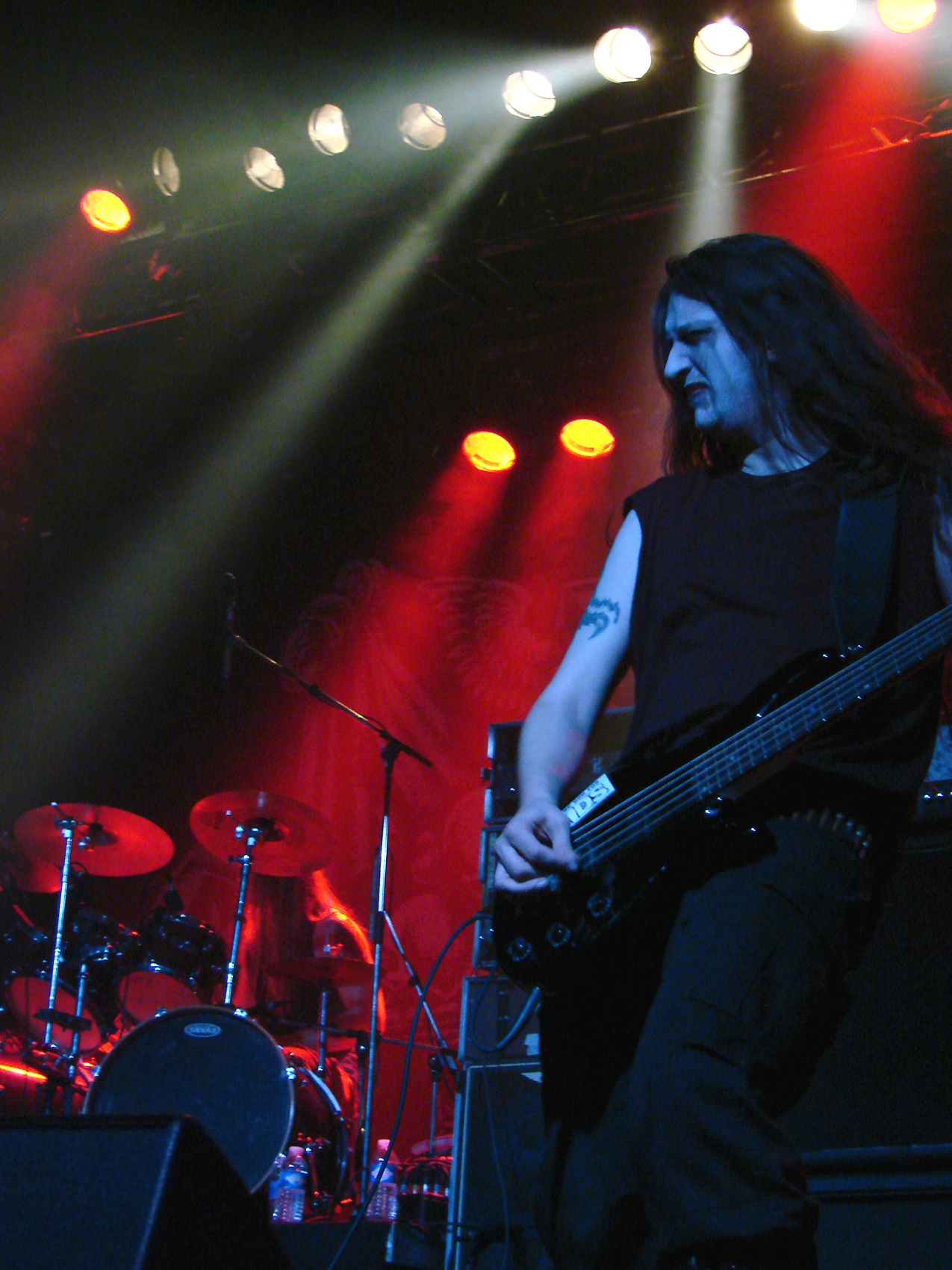 Marduk en concert à l'Elysée-Monmartre, Paris, le 2/12/2007. Morgan à la guitare.